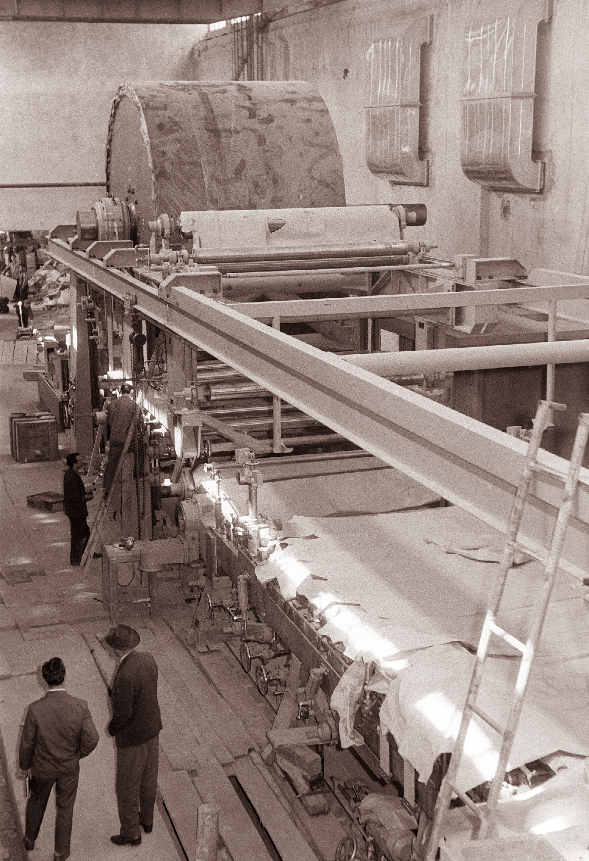 Tovarna kartona in papirja Sladki Vrh